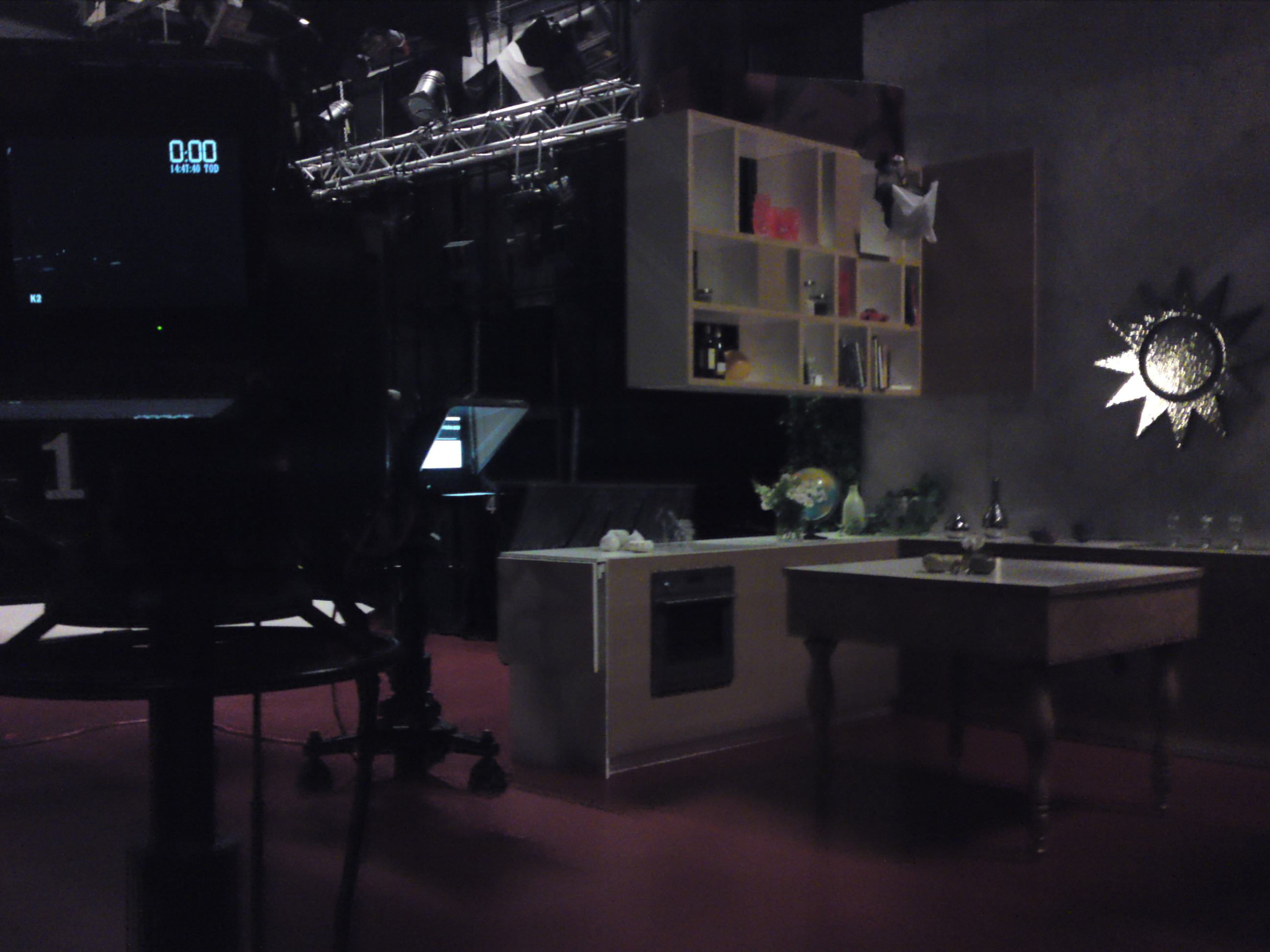 TV4, Stockholm